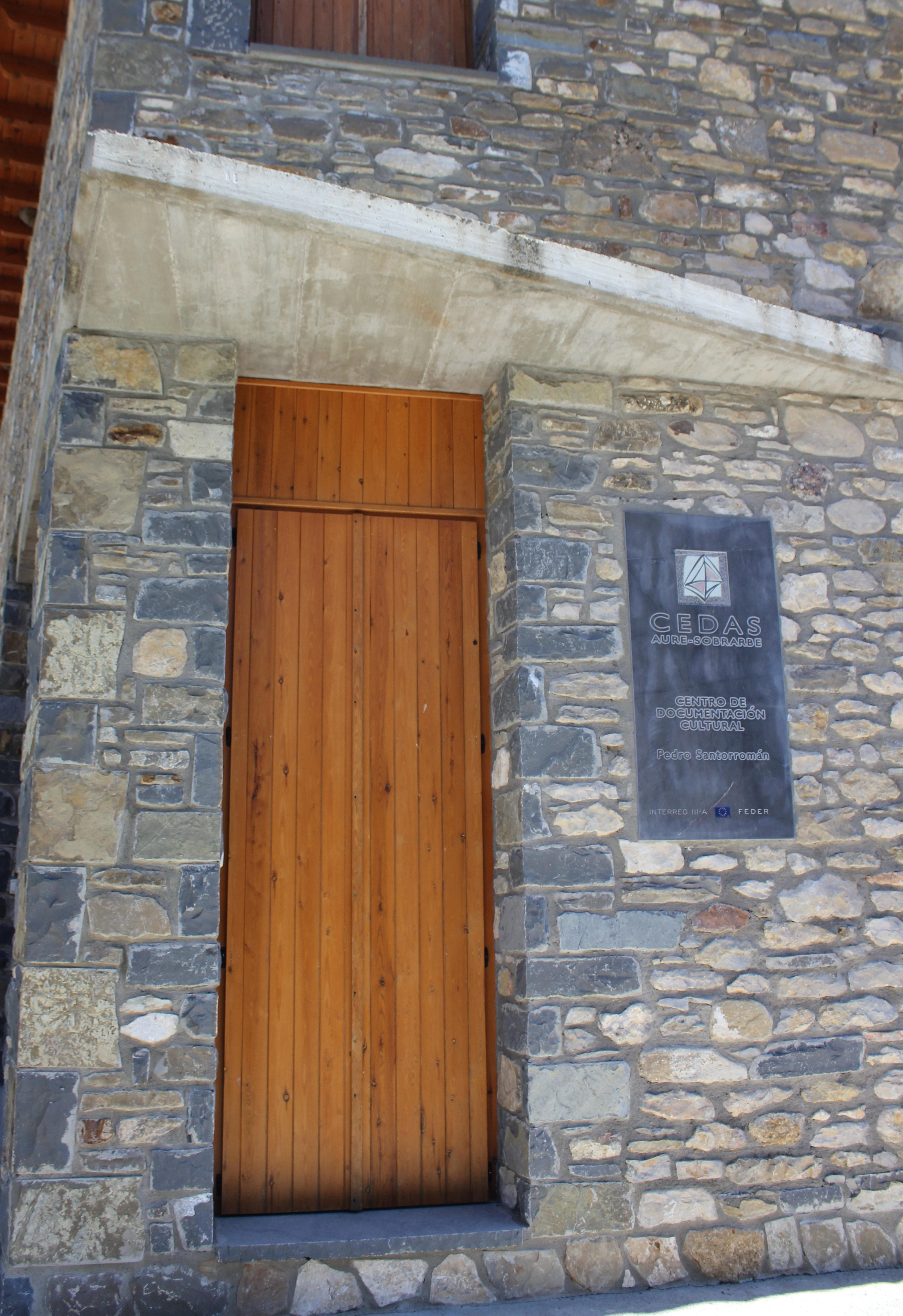 Aragonés: l'Abizanda